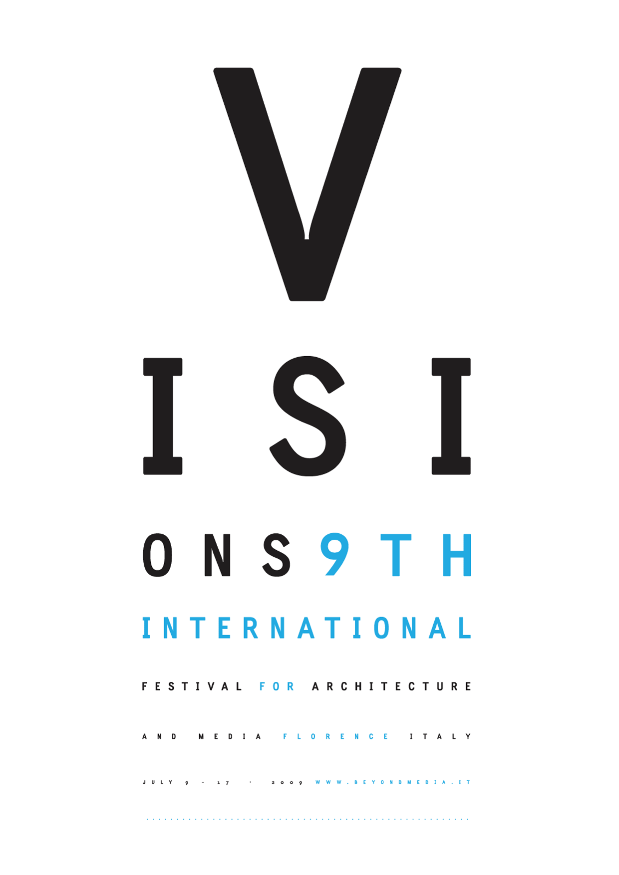 "The poster for Beyond Media 2009: Visions"